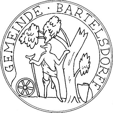 Pečeť obce Bartovice z roku 1820.